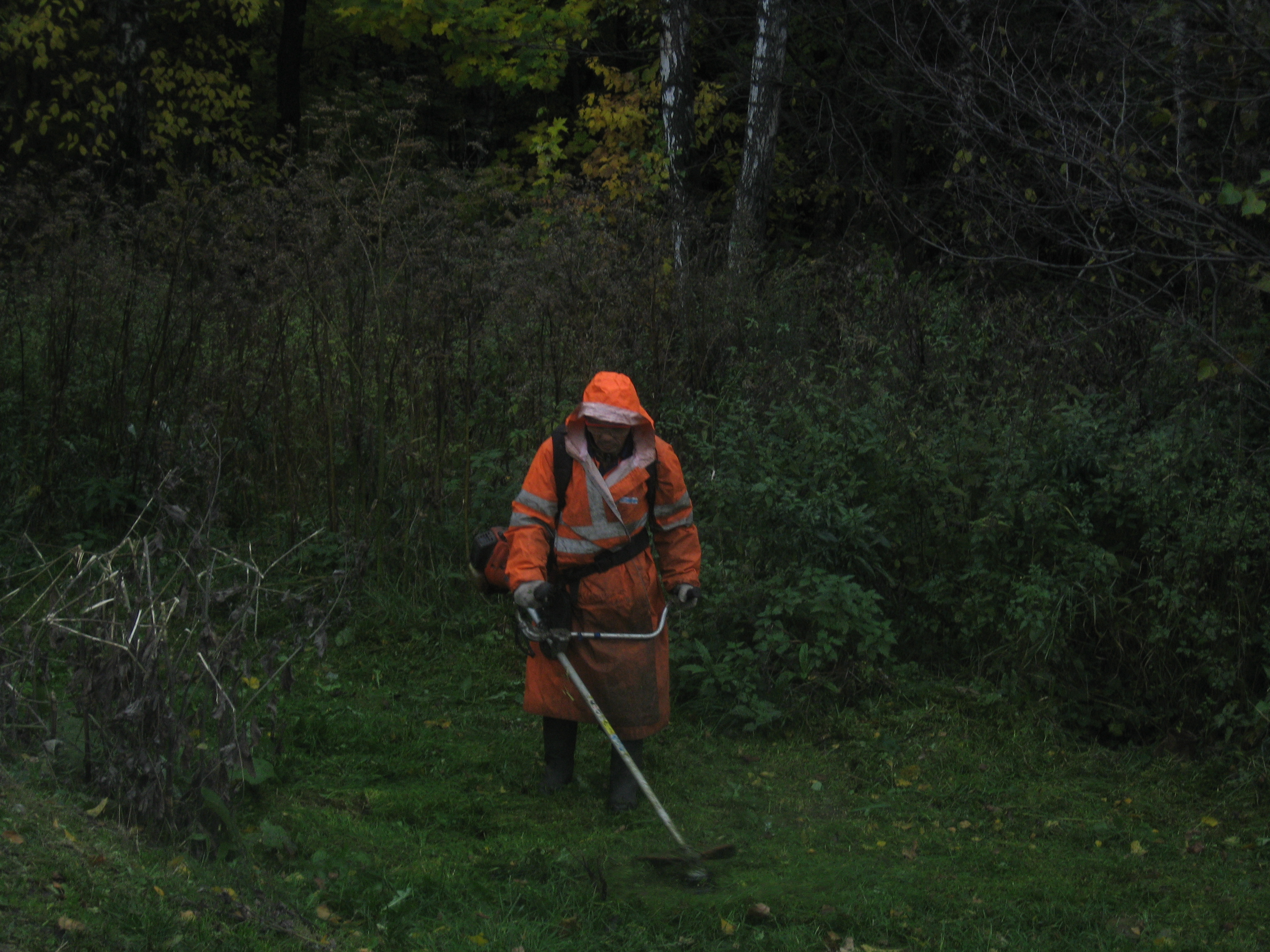 Покос травки на обочине МКАД, октябрь 2017 г.